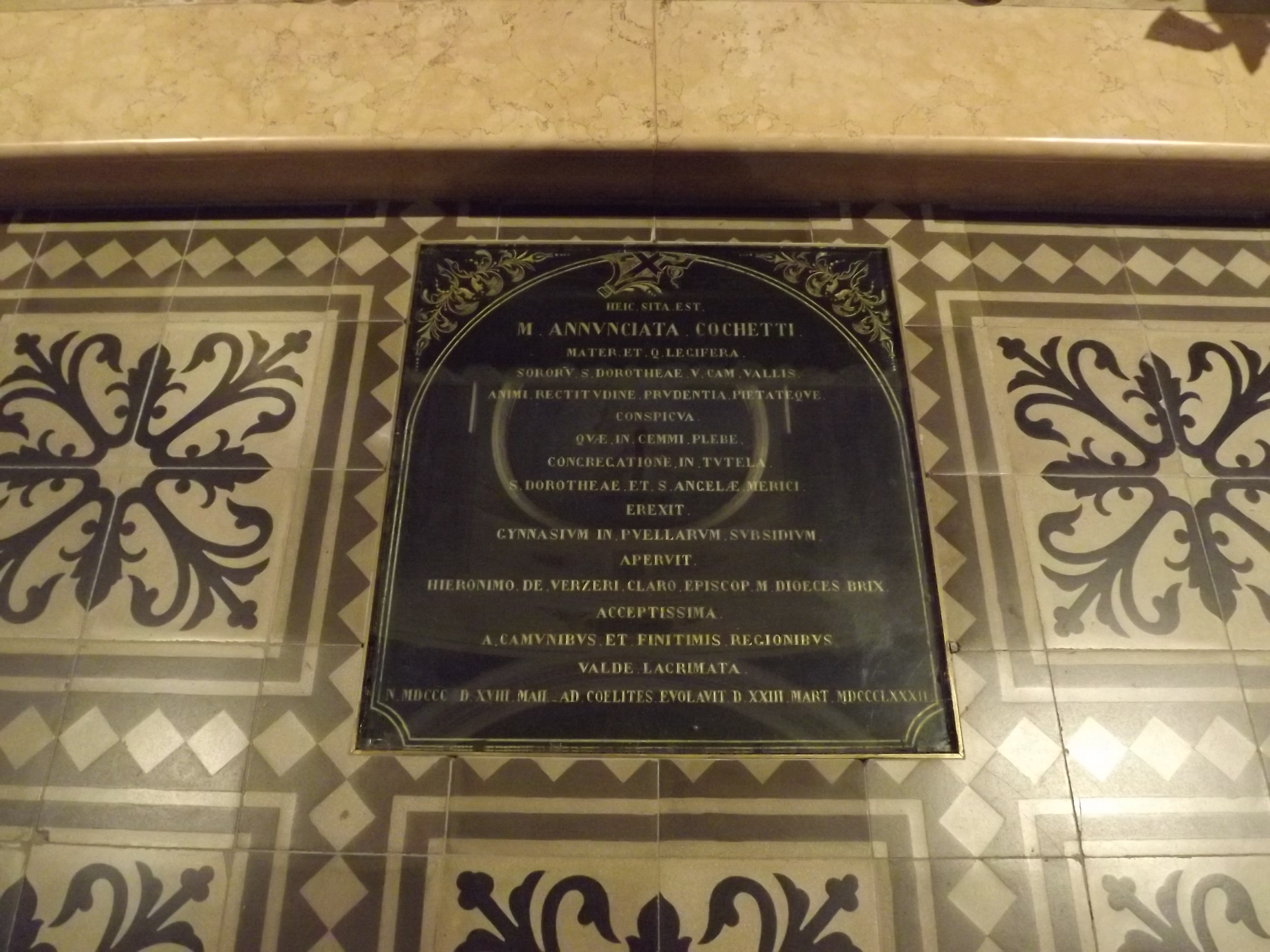 Lápida de la tumba de la Beata Annunciata Coccheti, Cemmo, Provincia de Brescia, Italia. Capilla de la Casa Madre de las Hermanas de Santa Dorotea de Cemmo.